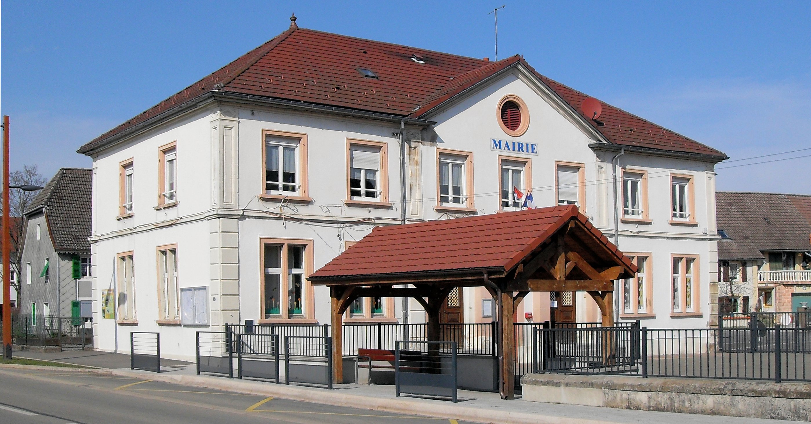 La mairie de Sermamagny